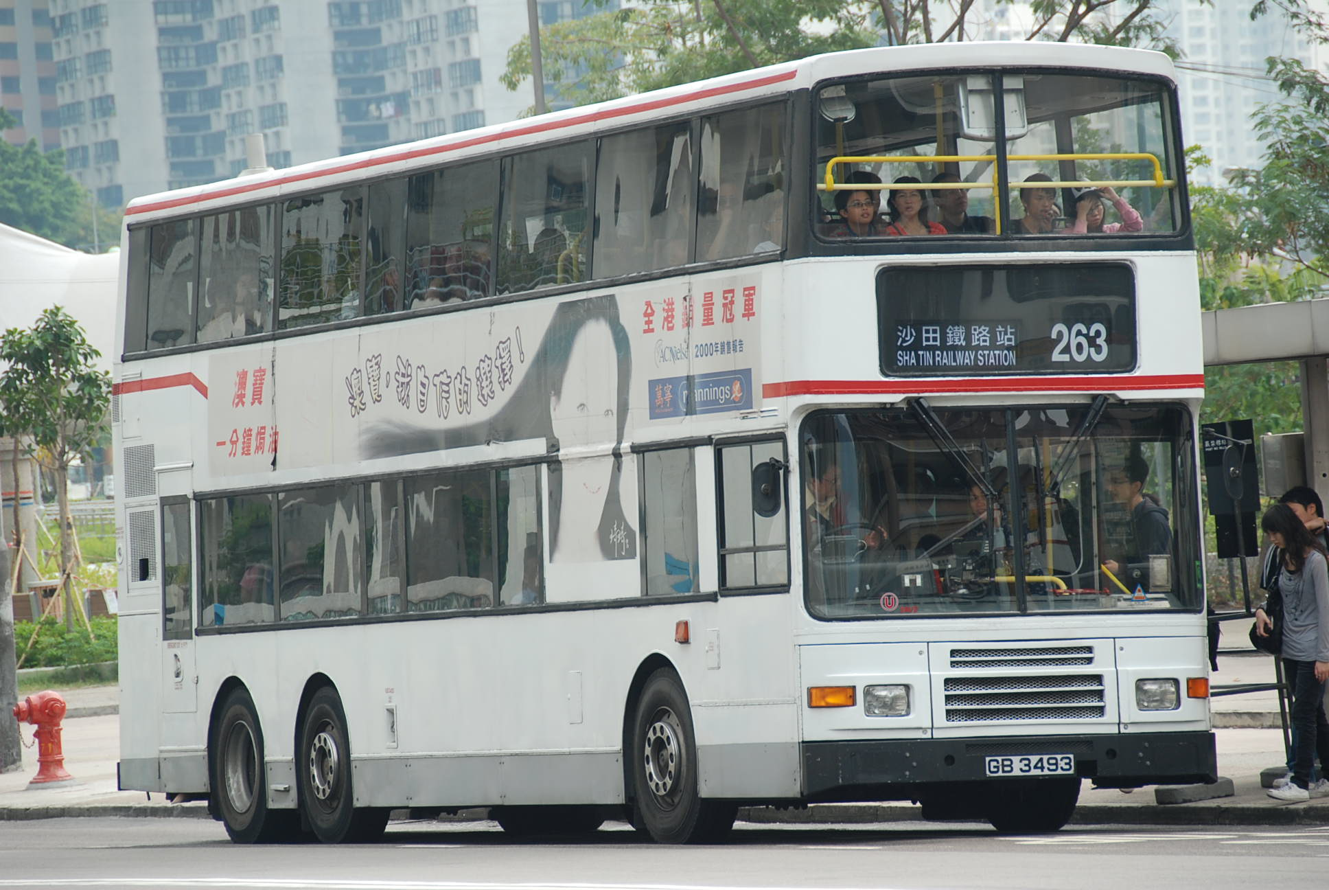 3AV2